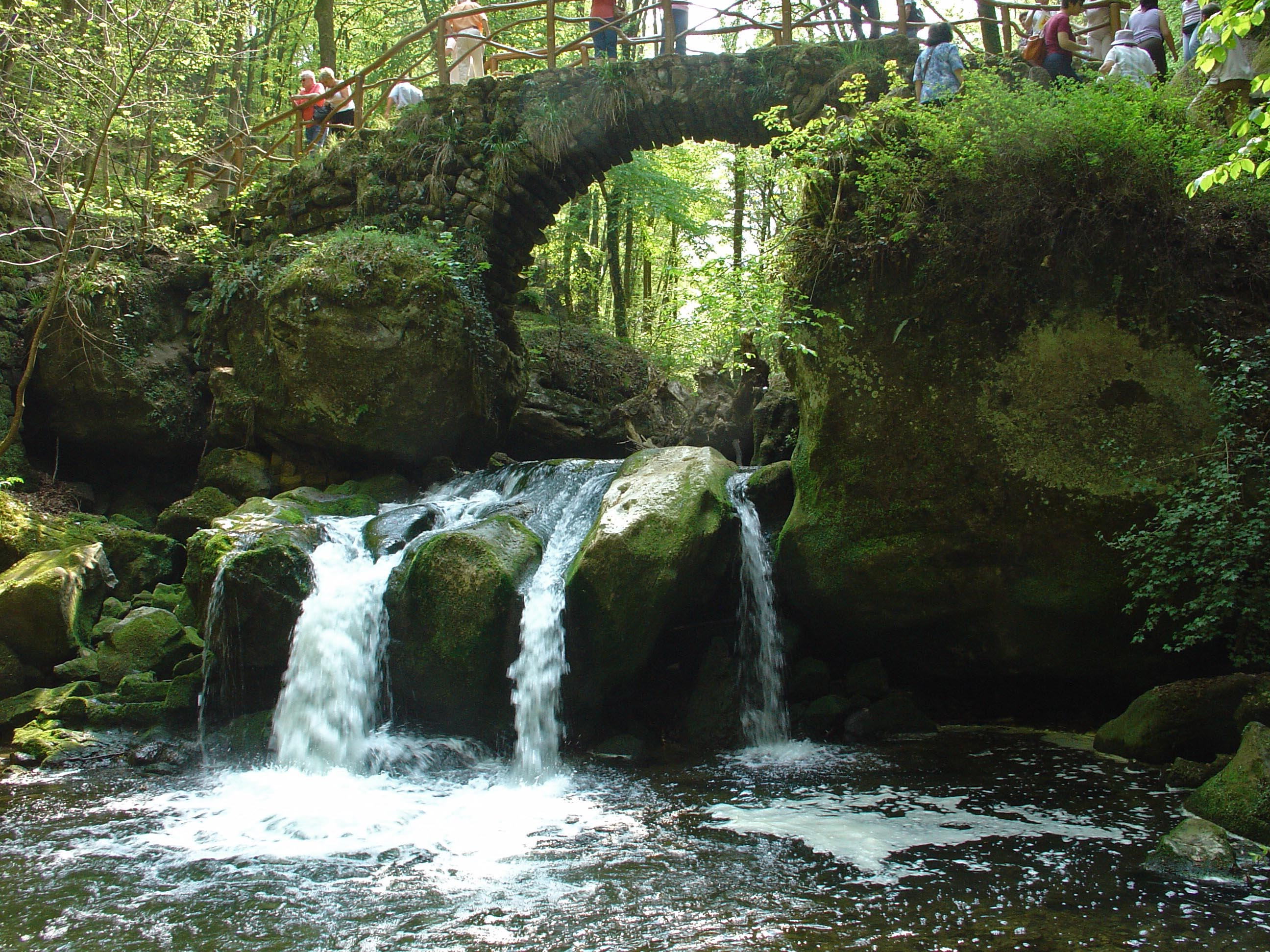 Schiessentumpel in Mullertal Luxemburg